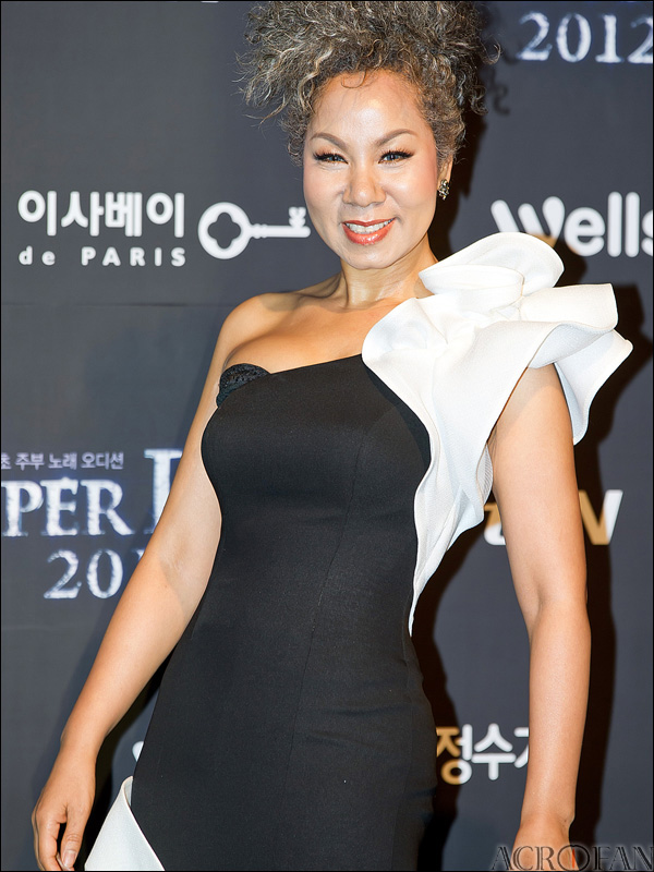 인순이. tvN '슈퍼디바 2012' 제작발표회에서